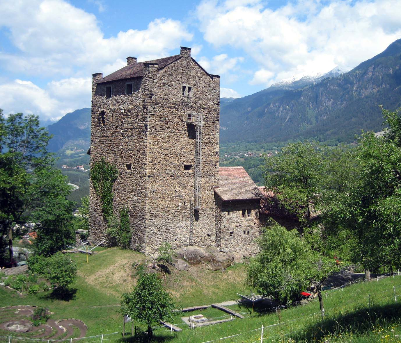 Ehrenfels von Norden